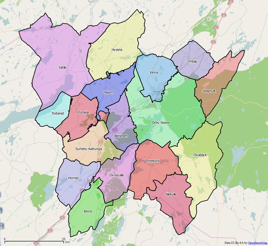 Distriktsindelningen i Marks kommun World file: 81.38284473073825609 0 0 -81.38284473073825609 1359895.99653481156565249 7895542.40442232042551041